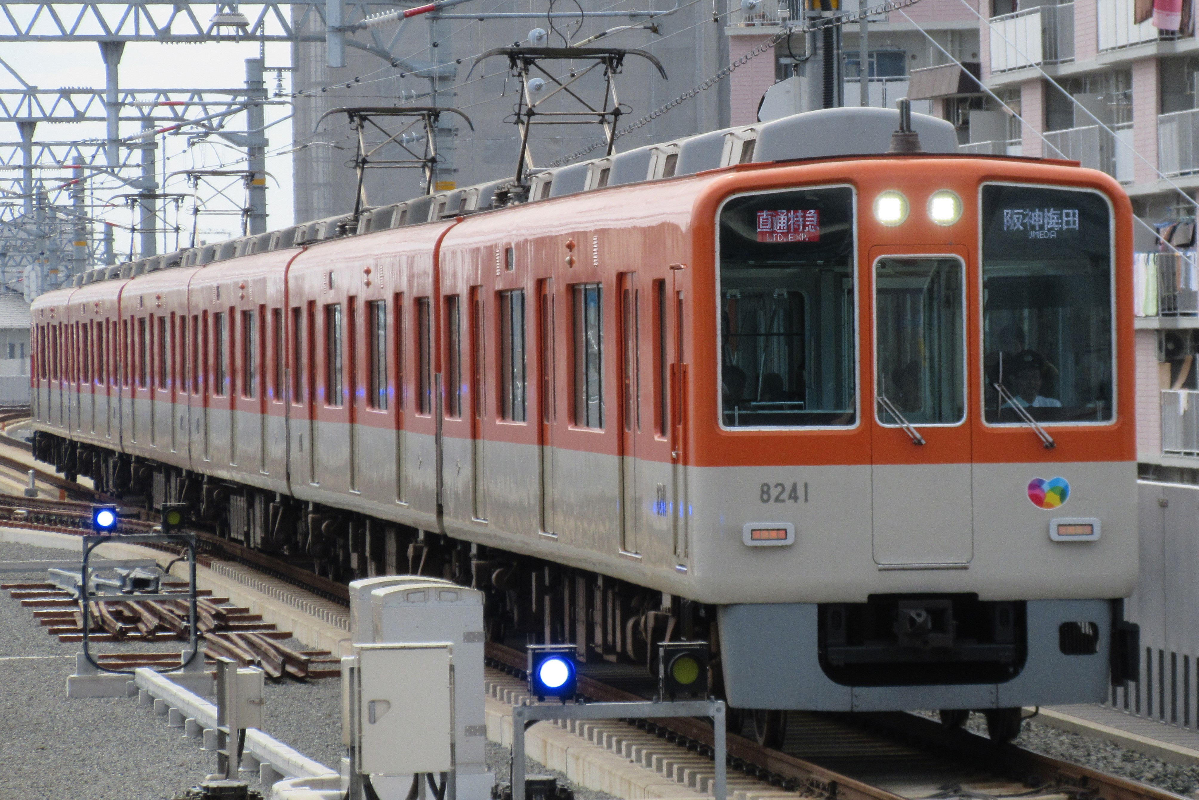 阪神電鉄8241(西新町駅にて)